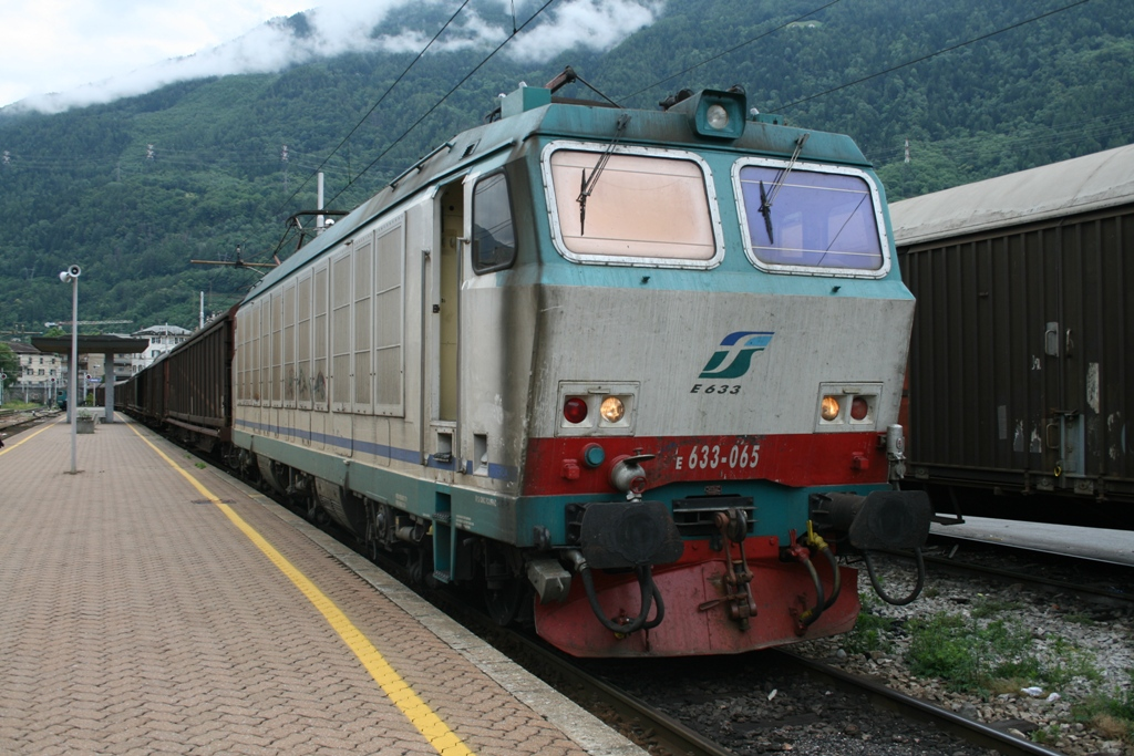 Locomotiva E.633.065 in livrea XMPR pronta col suo merci in partenza sul binario 3 della stazione di Tirano